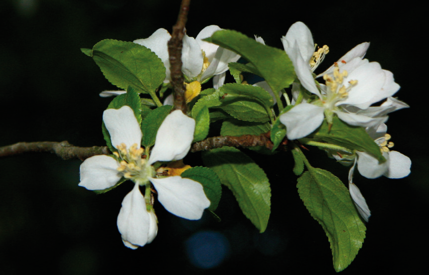 Frutto